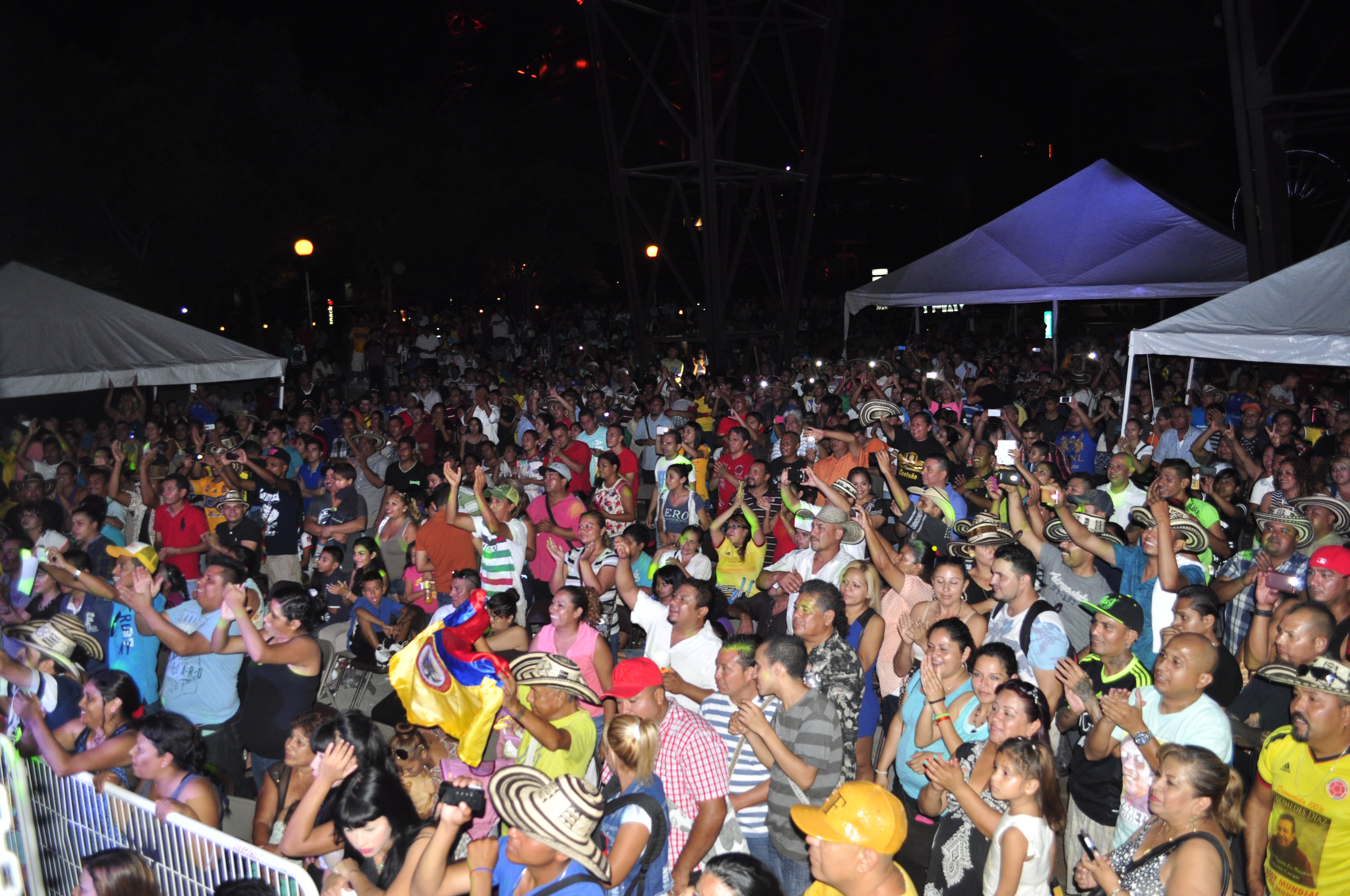 Noche del 20 de Septiembre del 2015, en el Festival Internacional Vallenato de Monterrey